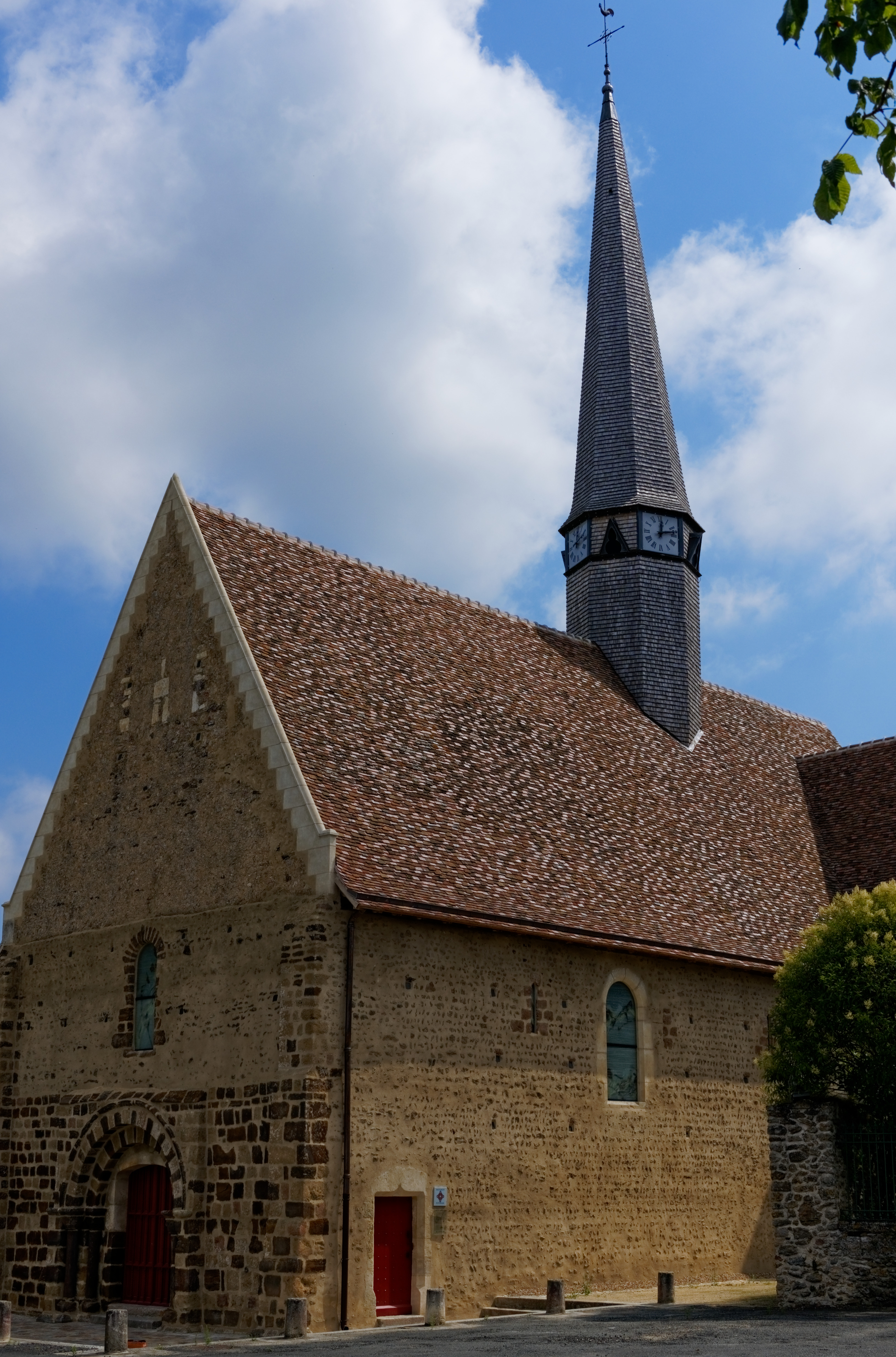 Eglise Saint-Pierre après restauration, 2014, Lavaré, France